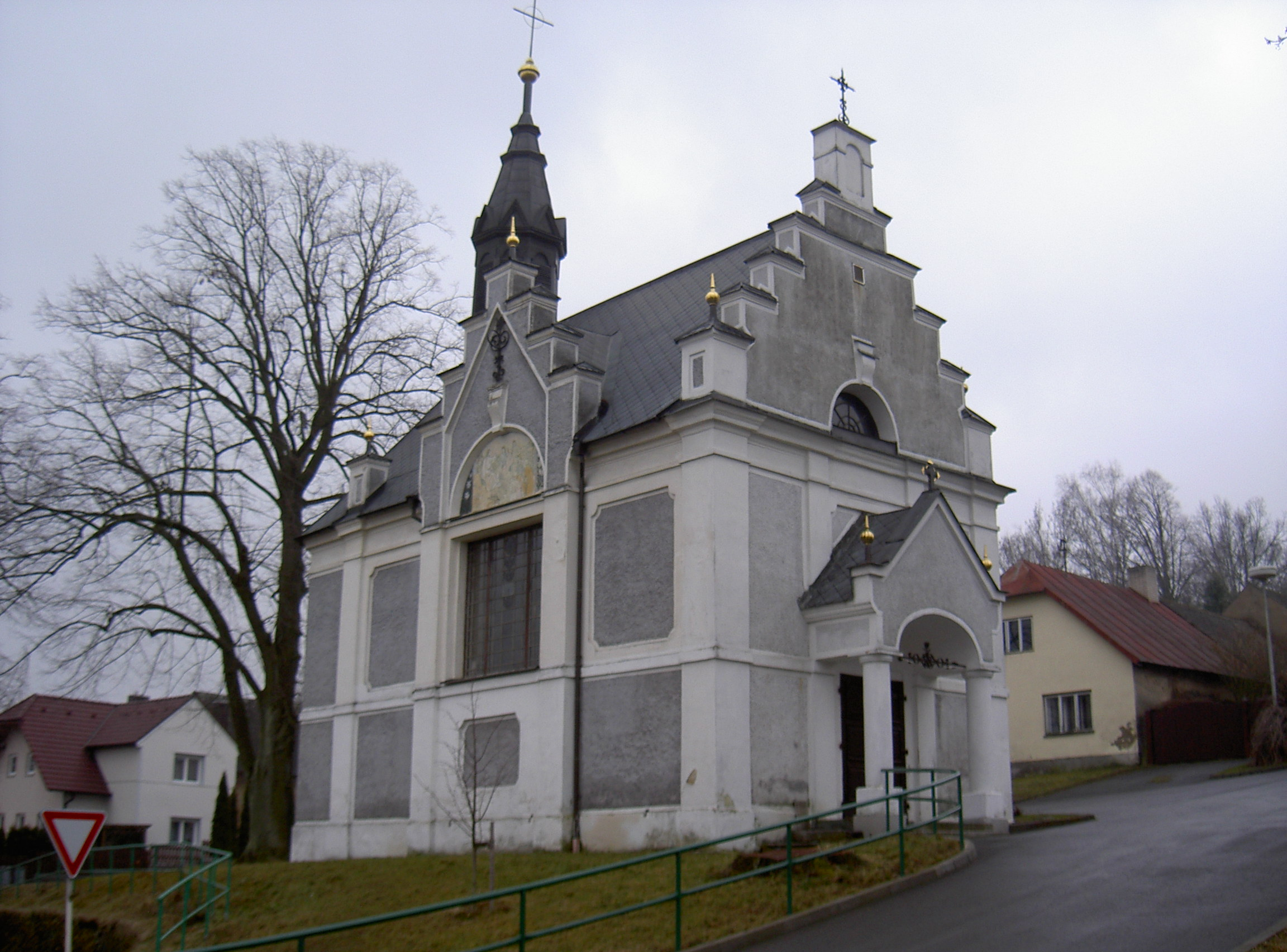 Postřekov Kirche St. Jakob